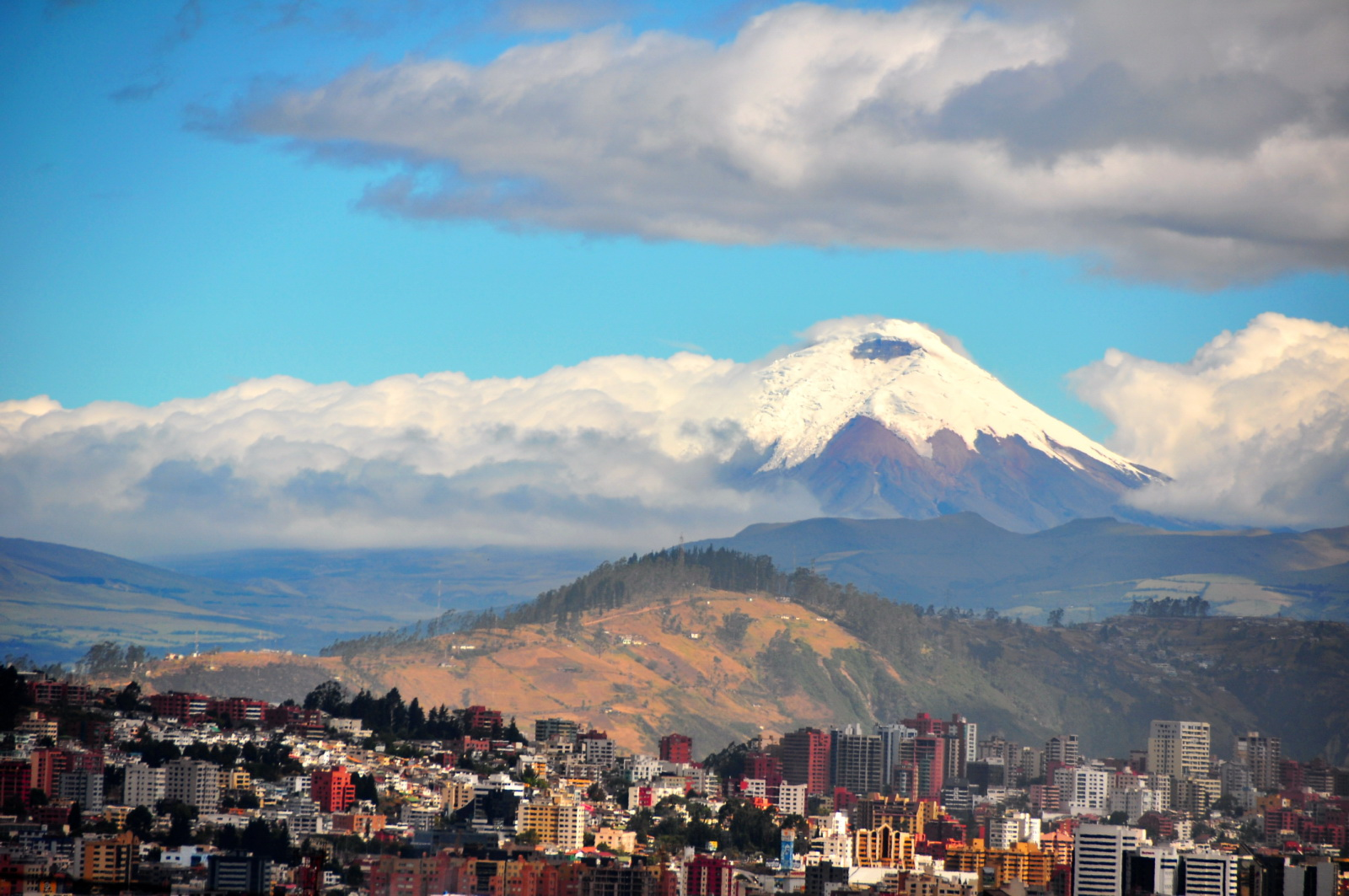 Quito, Ecuador